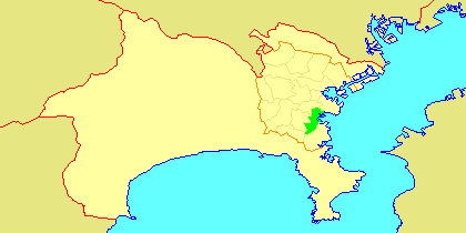 Map of Isogo-ku, Yokohama, Kanagawa-prefecture, Japan